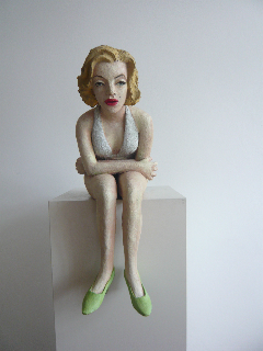 Skulptur, Quarz-Zellulose Mischtechnik, ca. 60 Cm hoch